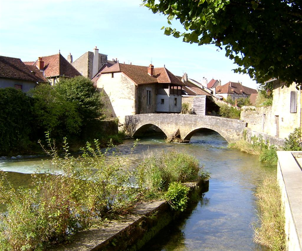 Het stadje Arbois gelegen aan de Cuisance.